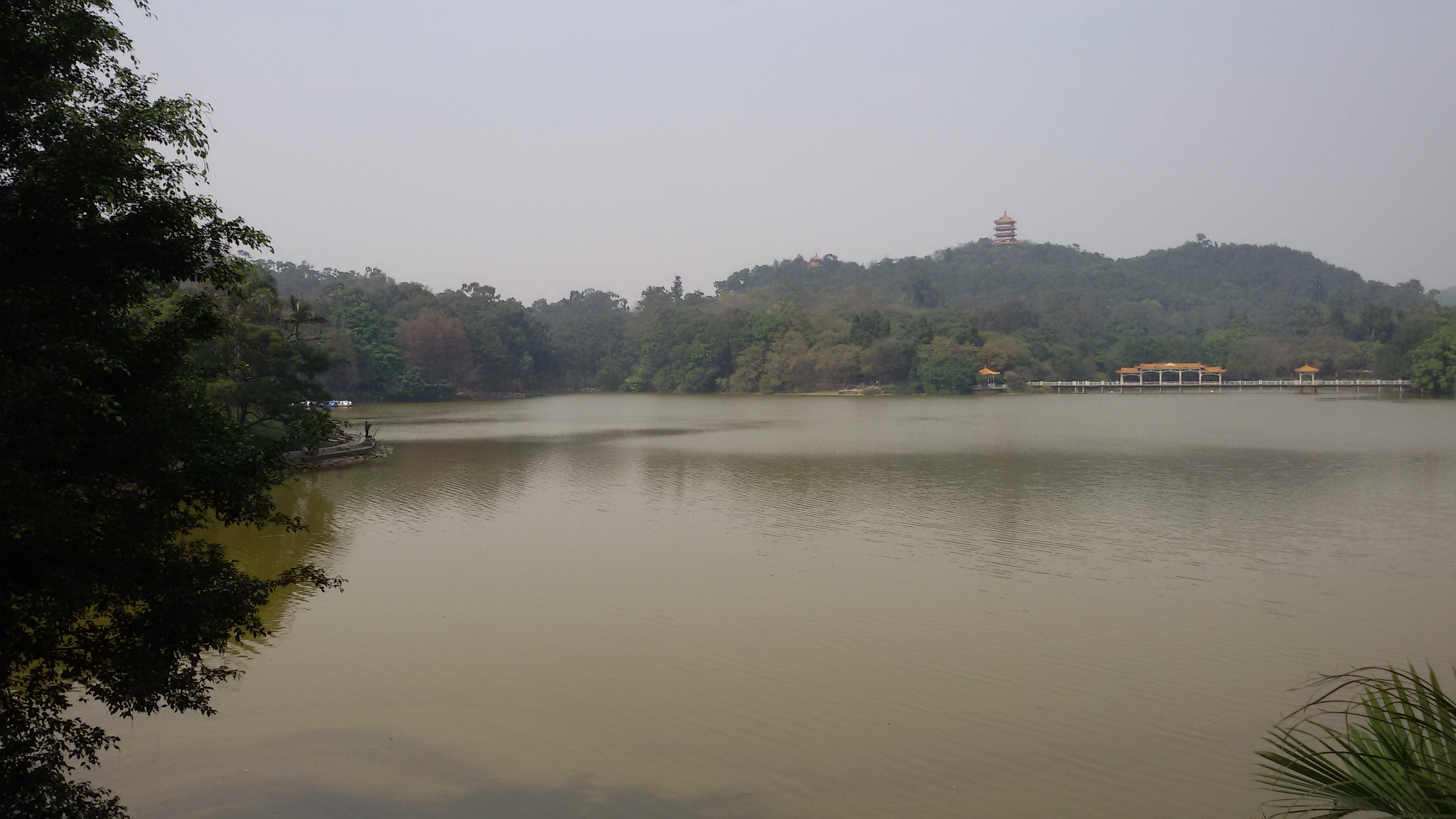 粵語: 麓湖公園嘅大湖西邊